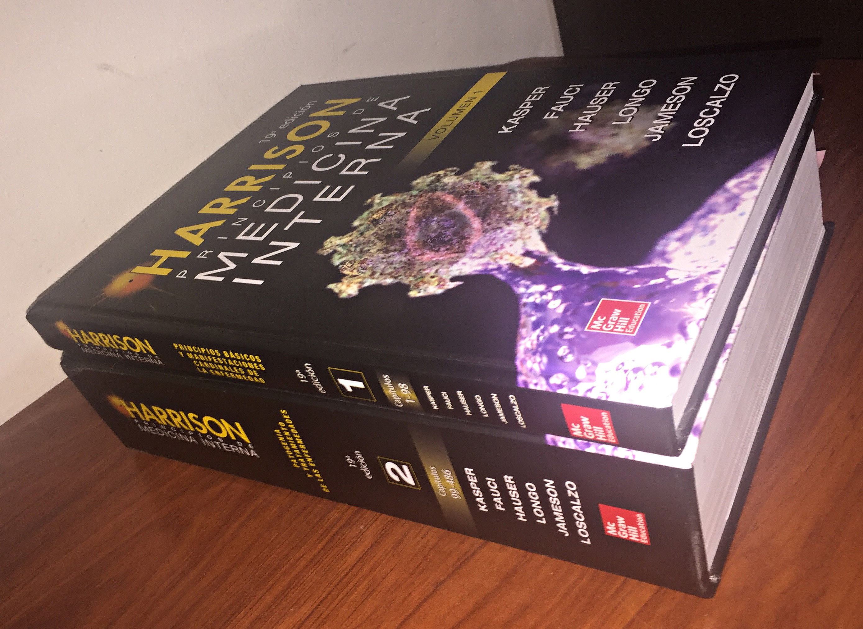 Ejemplar del libro en su última edición en Español